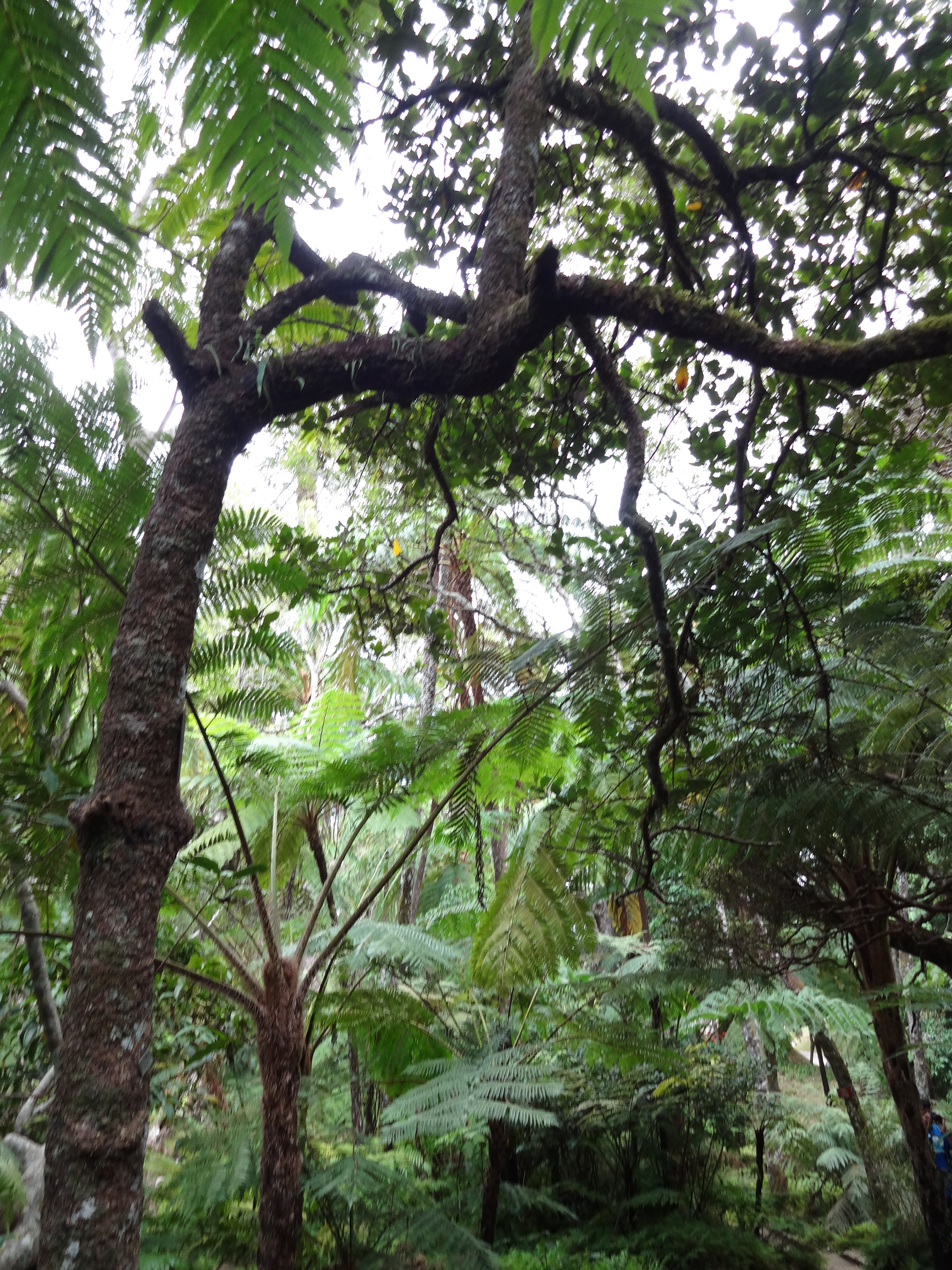 Litsea ovalifolia in Hakgala Botanical Garden